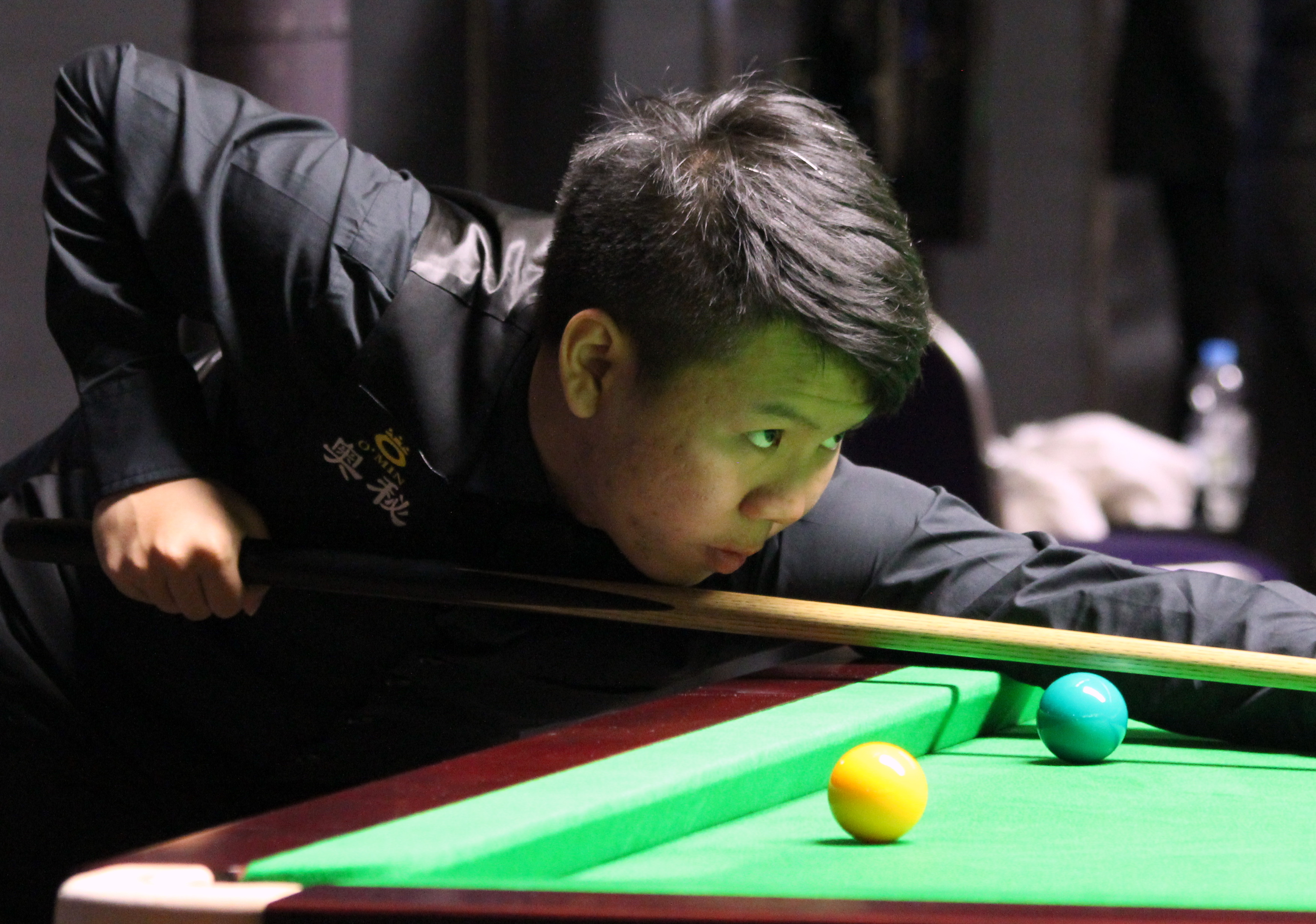 Zhou Yuelong beim Paul Hunter Classic 2016